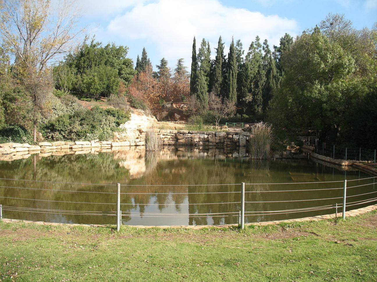 The lake at Wohl rose garden (Jerusalem)